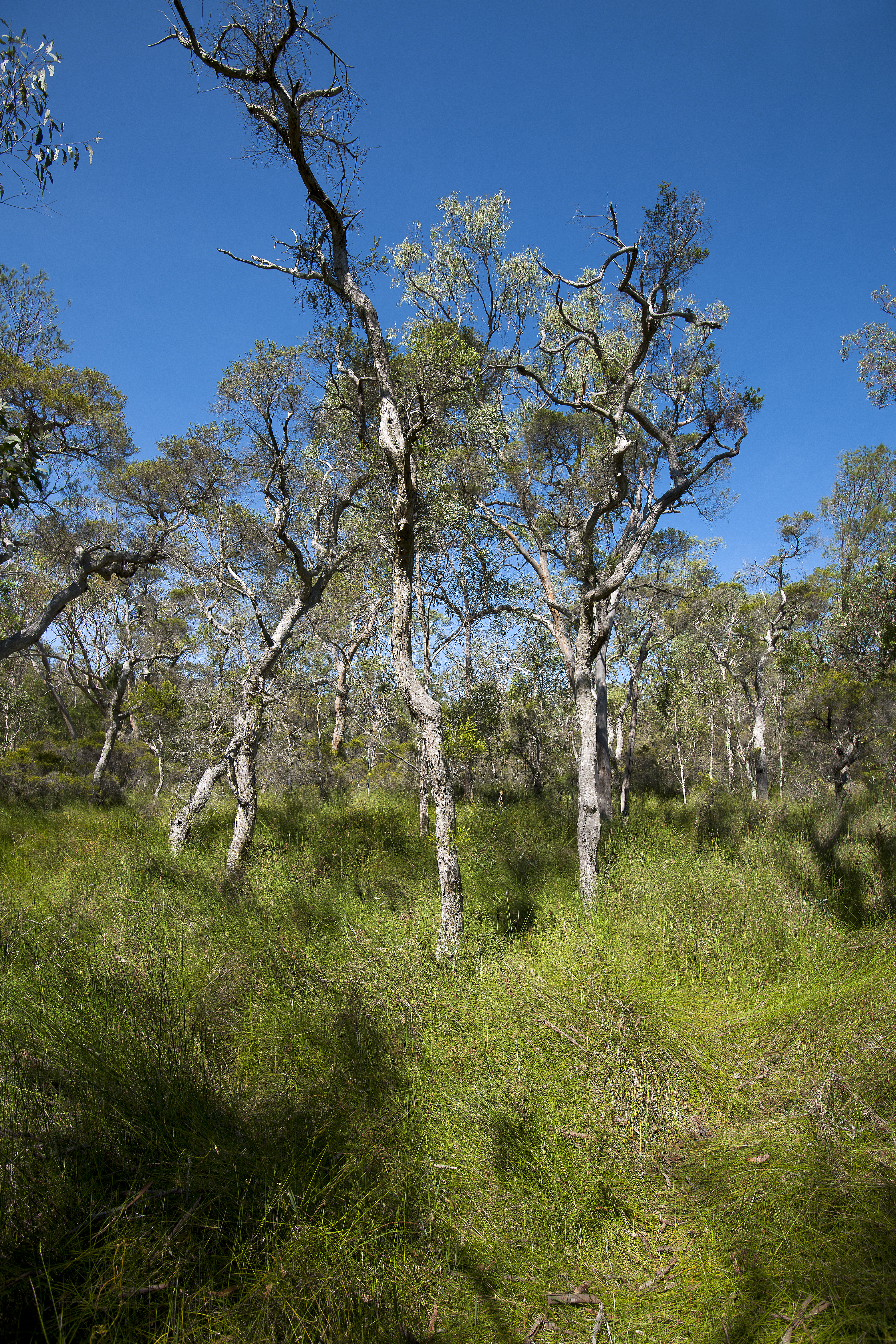 Brisbane Koala Bushlands